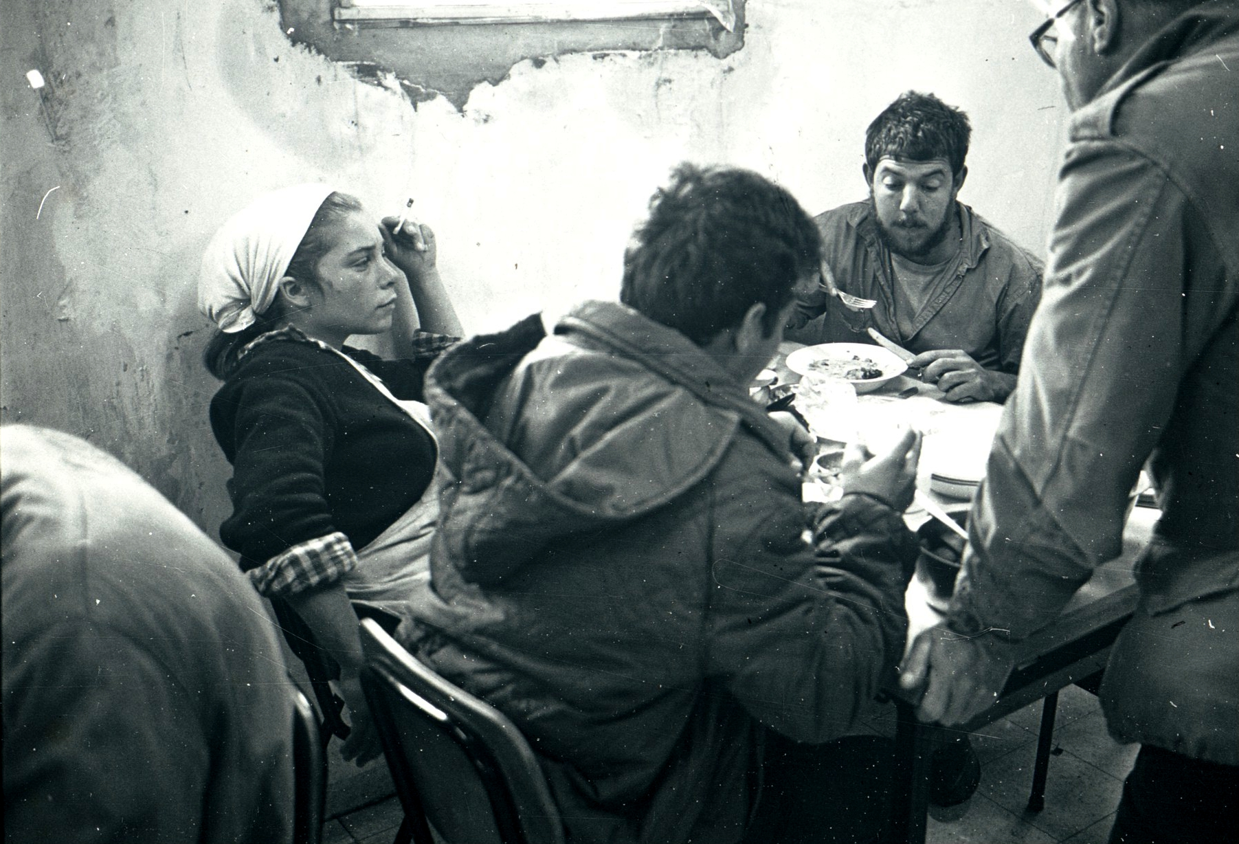 חד"א בקונטרה צפוף מאוד, Original Image Name:חד"א בקונטרה, Notes:קשיים רבים בגלל הצפיפות בחד"א והמטבח הזמני, לא נפתרה בעית הקירור ואנו חיים ללא אמצעי קירור והחד"א לא יכול לאכיל כ-100 איש., Location:בחד"א בקונטרה